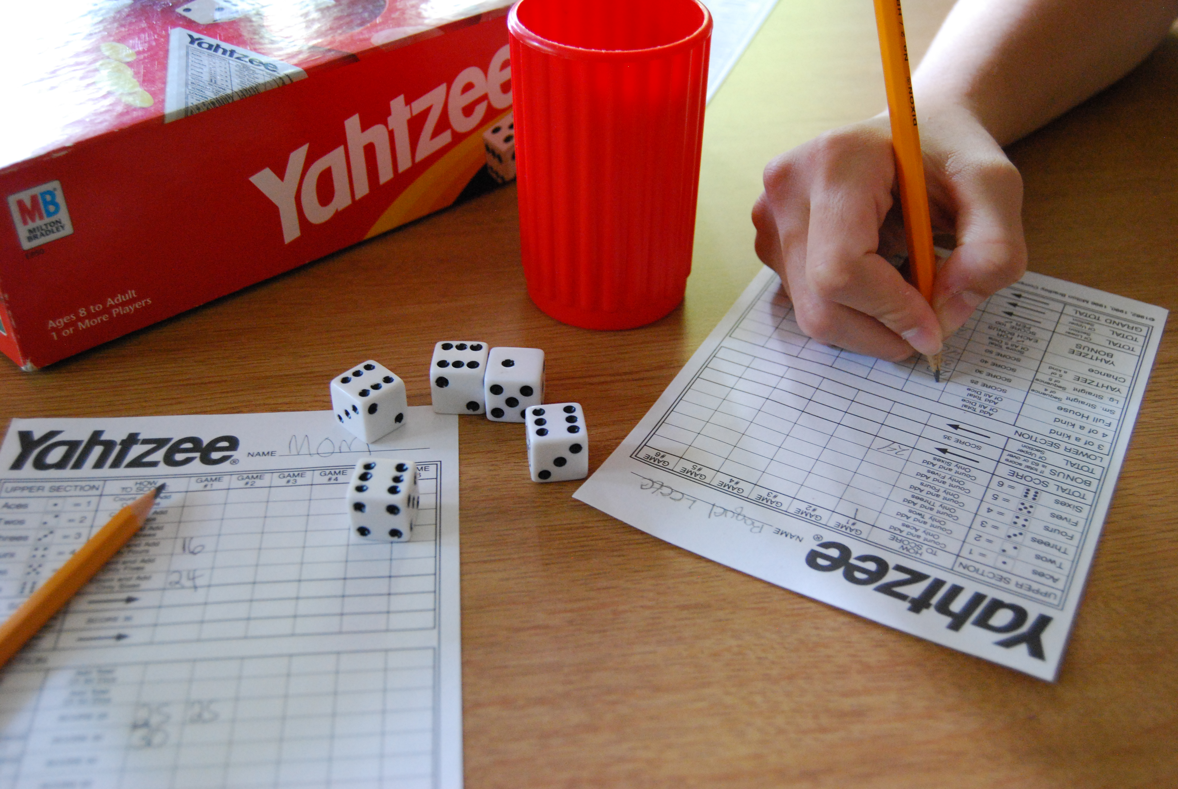 yahtzee